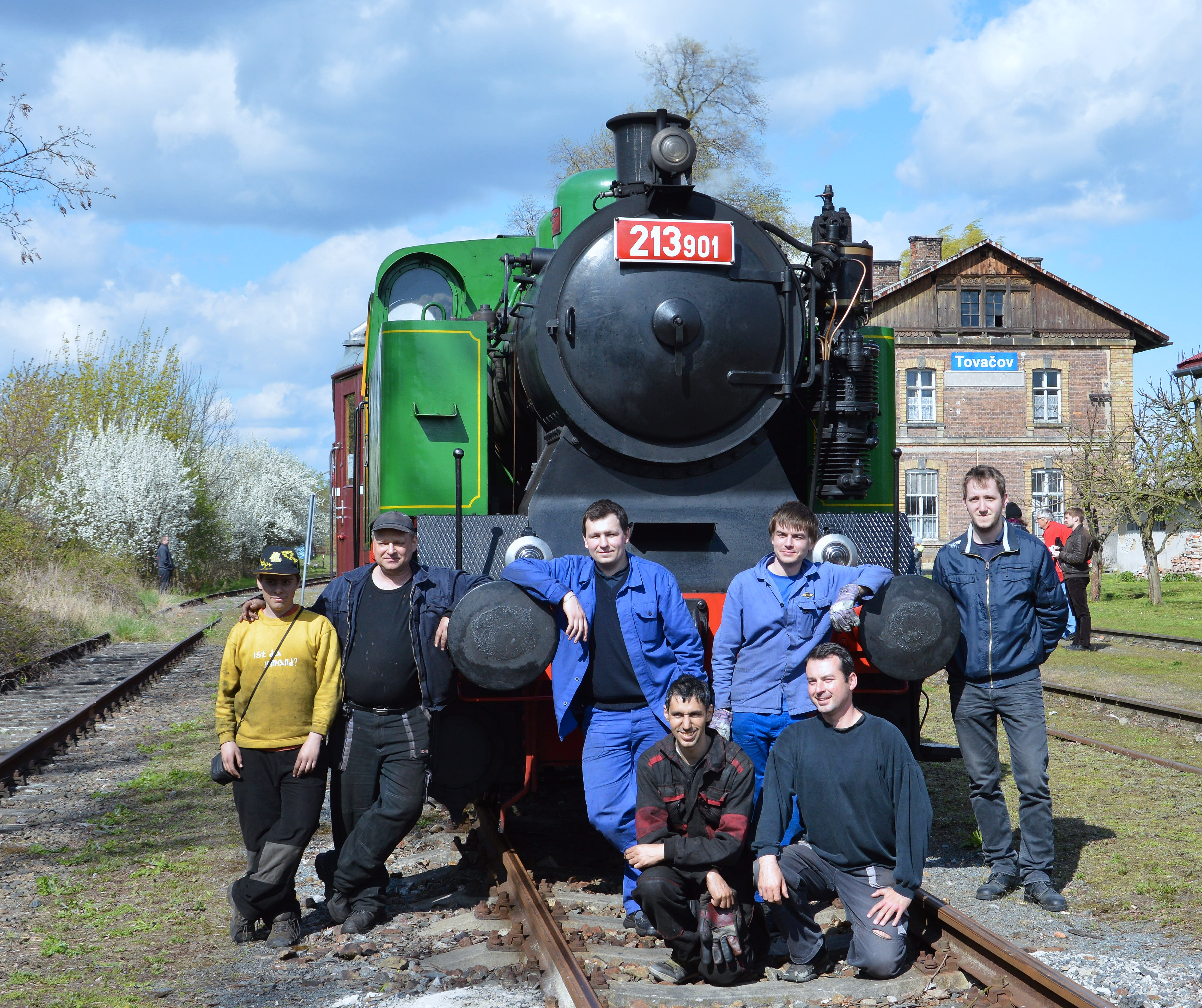 Členové KPKV Brno před parní lokomotivou ČKD 1435 BS 200 (213.901) dne 16.4.2017 v Tovačově